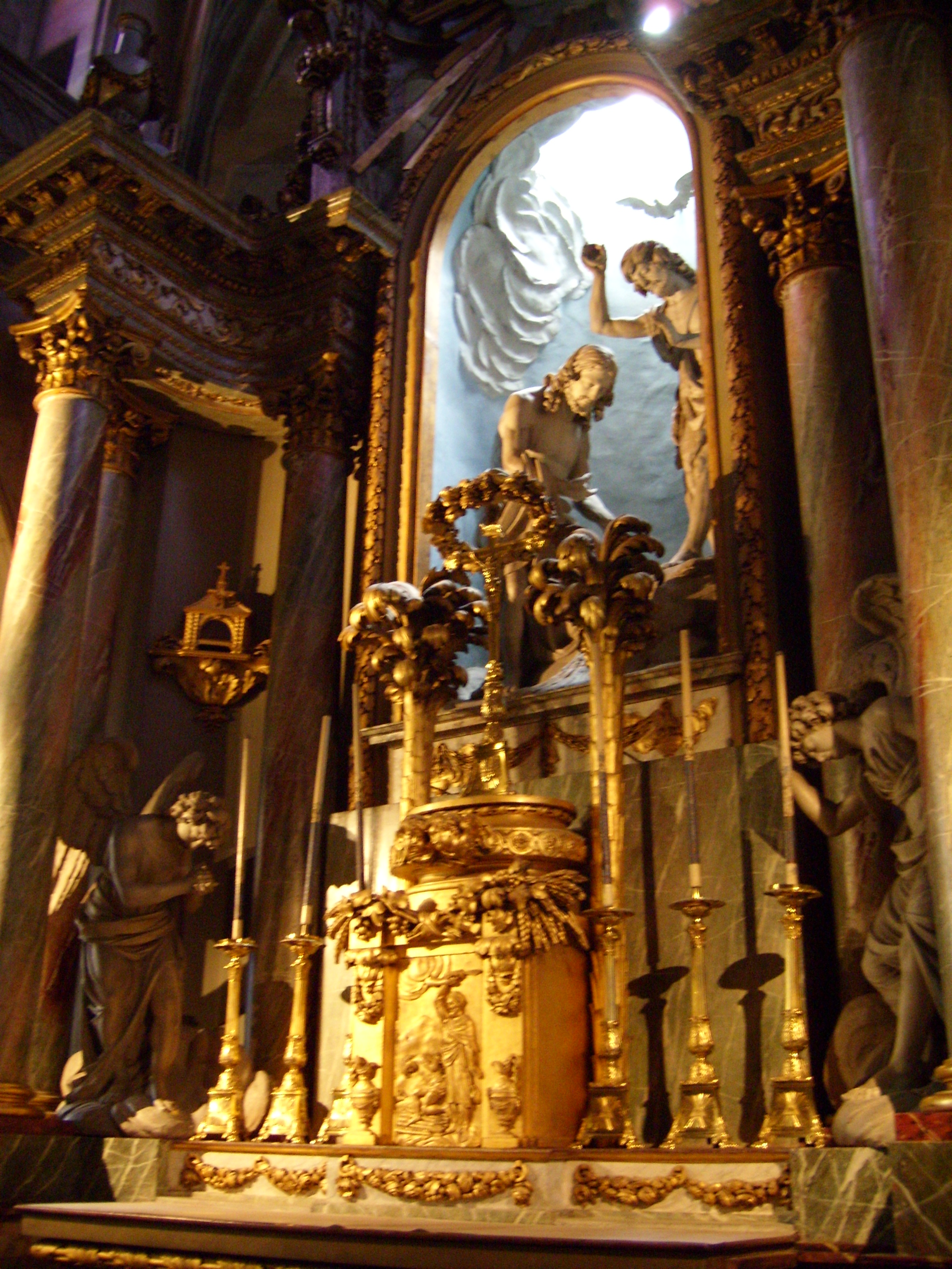 Gloire dans le choeur de la basilique de la Trinité, Cherbourg-Octeville